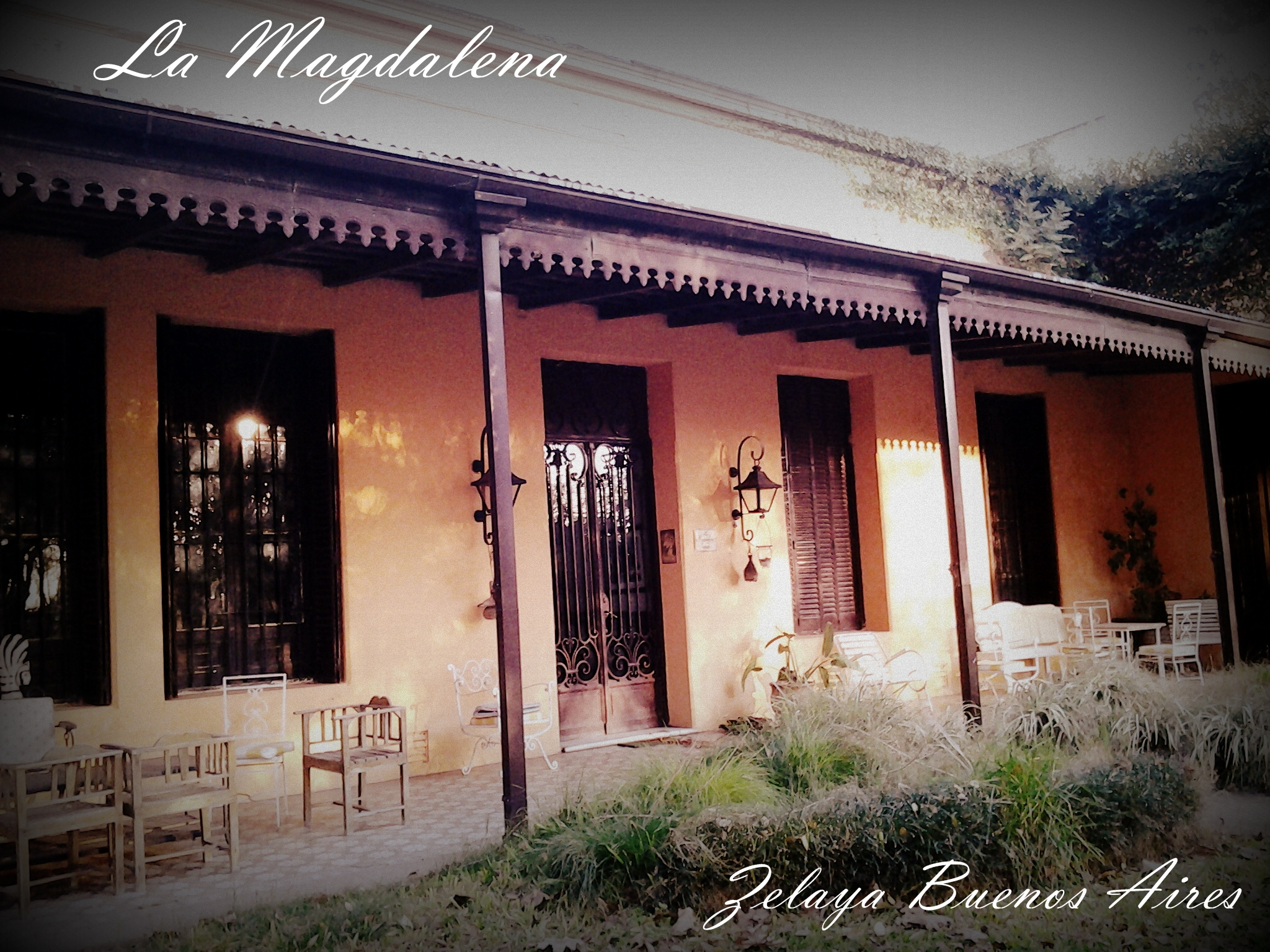 Estancia "La Magdalena" Primer Propietario: Bartolo Gallo Año: 1868 Ubicación: Zelaya Partido del Pilar.